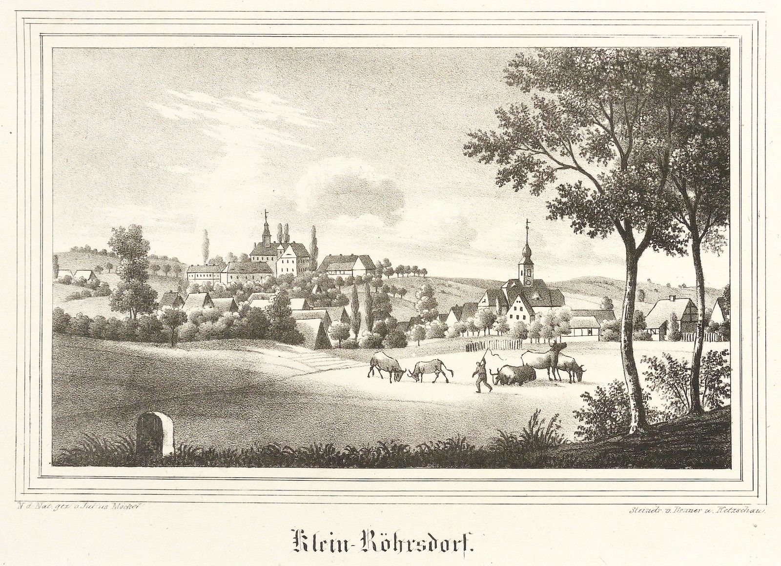 Röhrsdorf (Dohna): Gesamtansicht mit Schloss und Kirche. von Carl Julius Möckel (1801 - 1863) - Deutscher Landschafts- und Architekturzeichner in Dresden; veröffentlicht 1840 in Sachsens Kirchen-Galerie. Die Inspectionen Pirna, Altenberg und Dippoldiswalde (Dresden: Hermann Schmidt 1840), Bd. 4